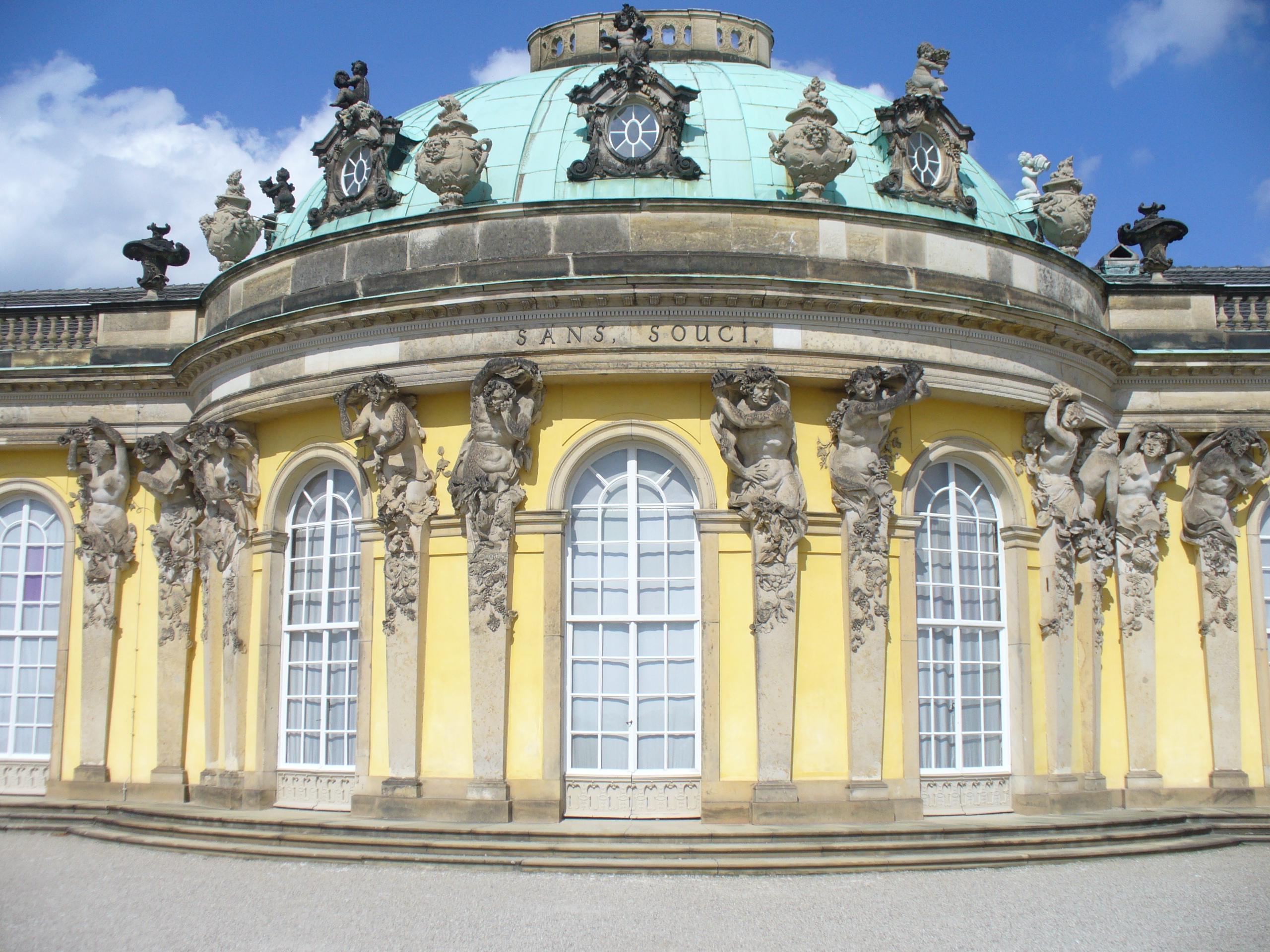 Schloß Sanssouci(frz.sans souci = ohne Sorge) 1745-1747 Architekt Georg Wenzeslaus von Knobelsdorff